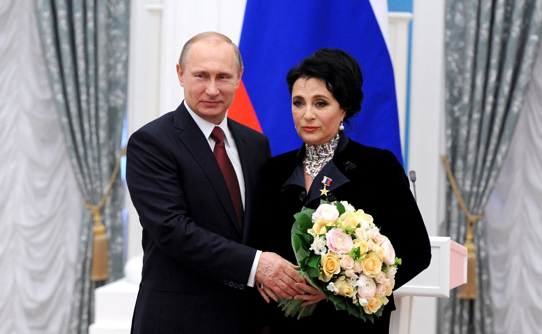 На церемонии награждения медалью «Герой Труда Российской Федерации»